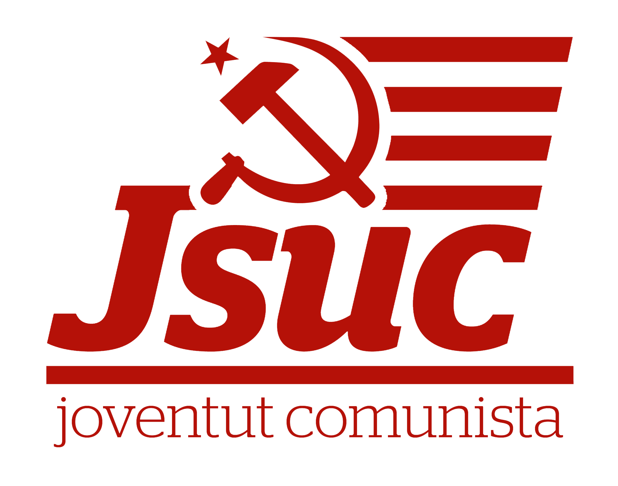 Logo de la JSUC